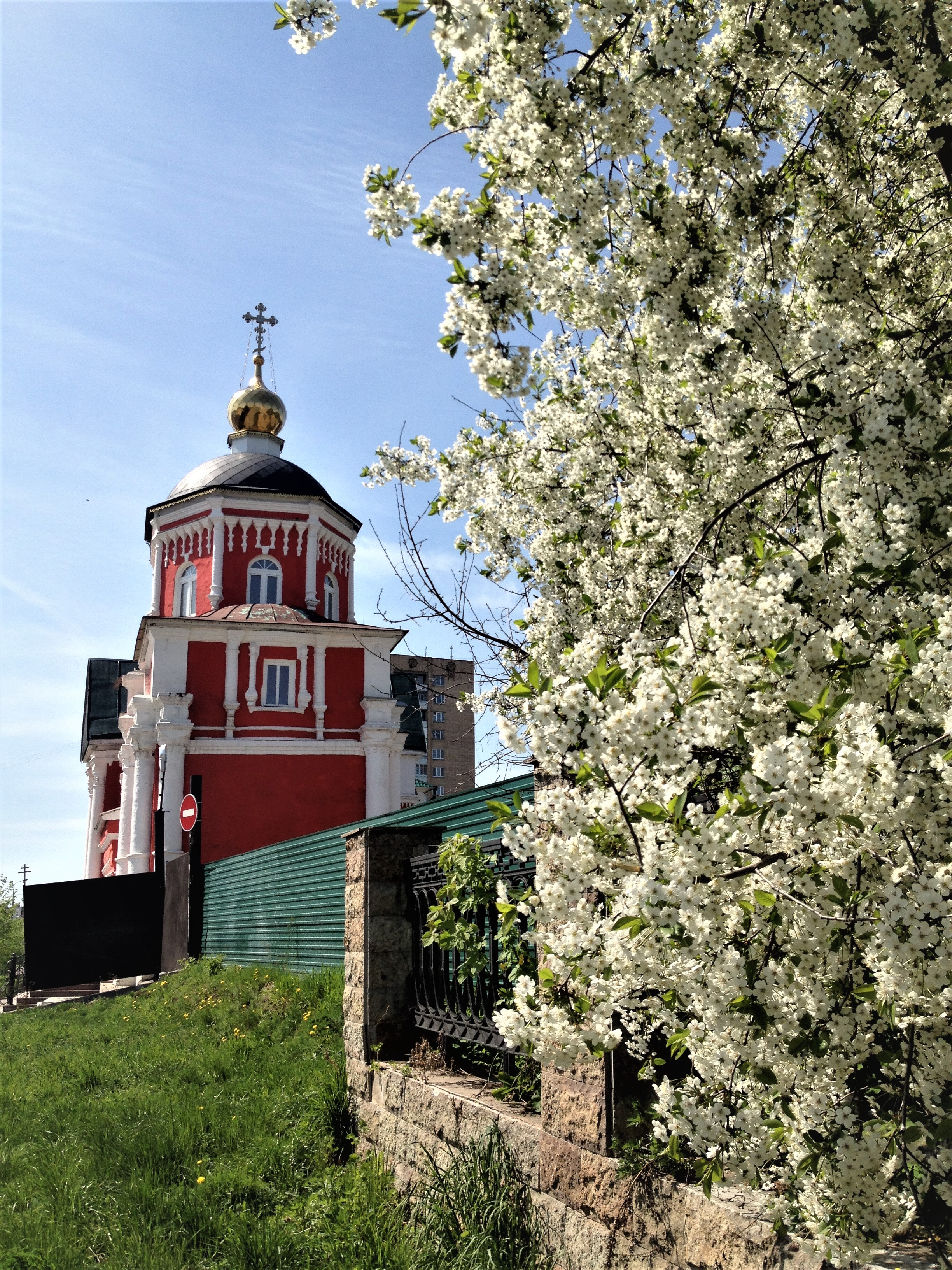 Надвратный храм во имя святого князя Владимира Кизического Введенского монастыря г. Казани.